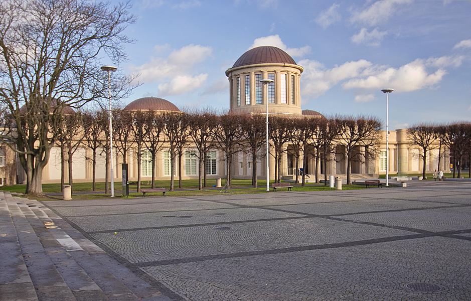 Pawilon Czterech Kopuł - Muzeum Sztuki Współczesnej